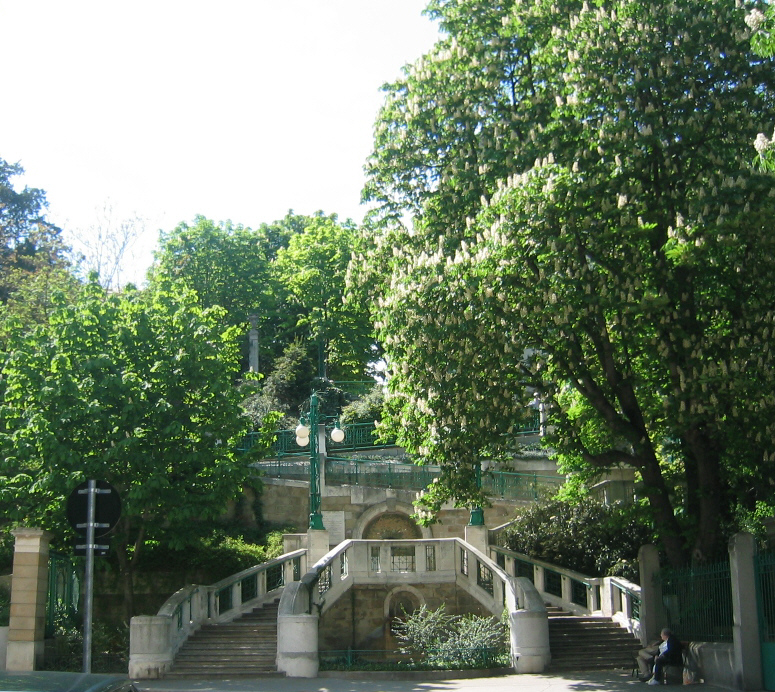 Wien, Österreich: Strudlhofstiege